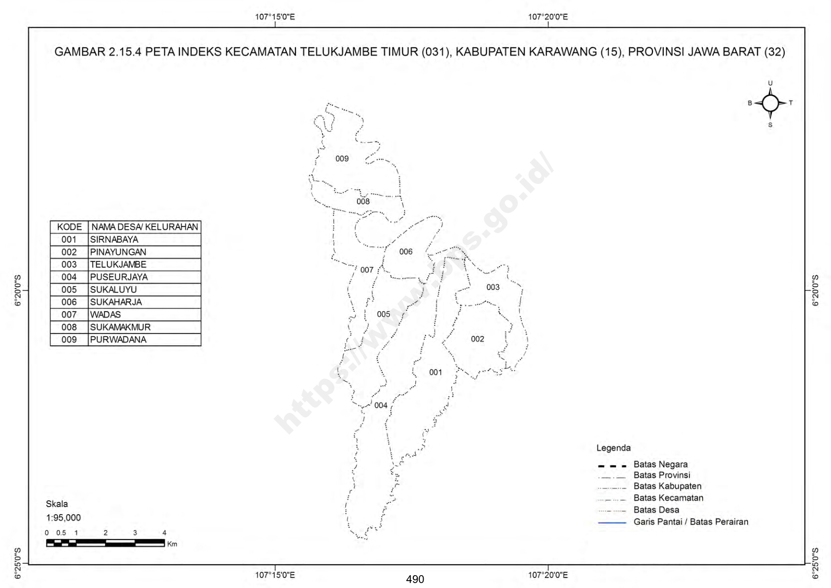 Peta Indeks Wilayah Kecamatan Telukjambe Timur Kabupaten Karawang, BPS 2010